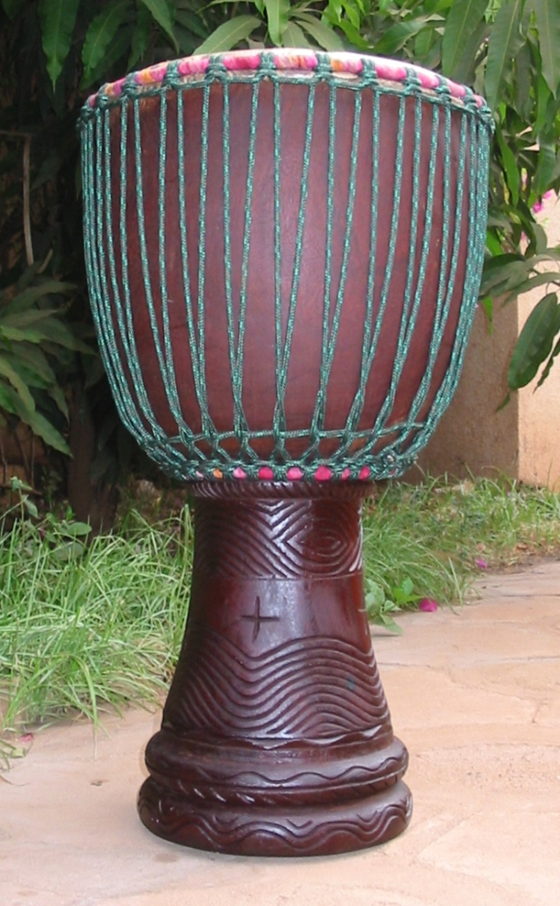 Djembe drum of hardwood and goatskin